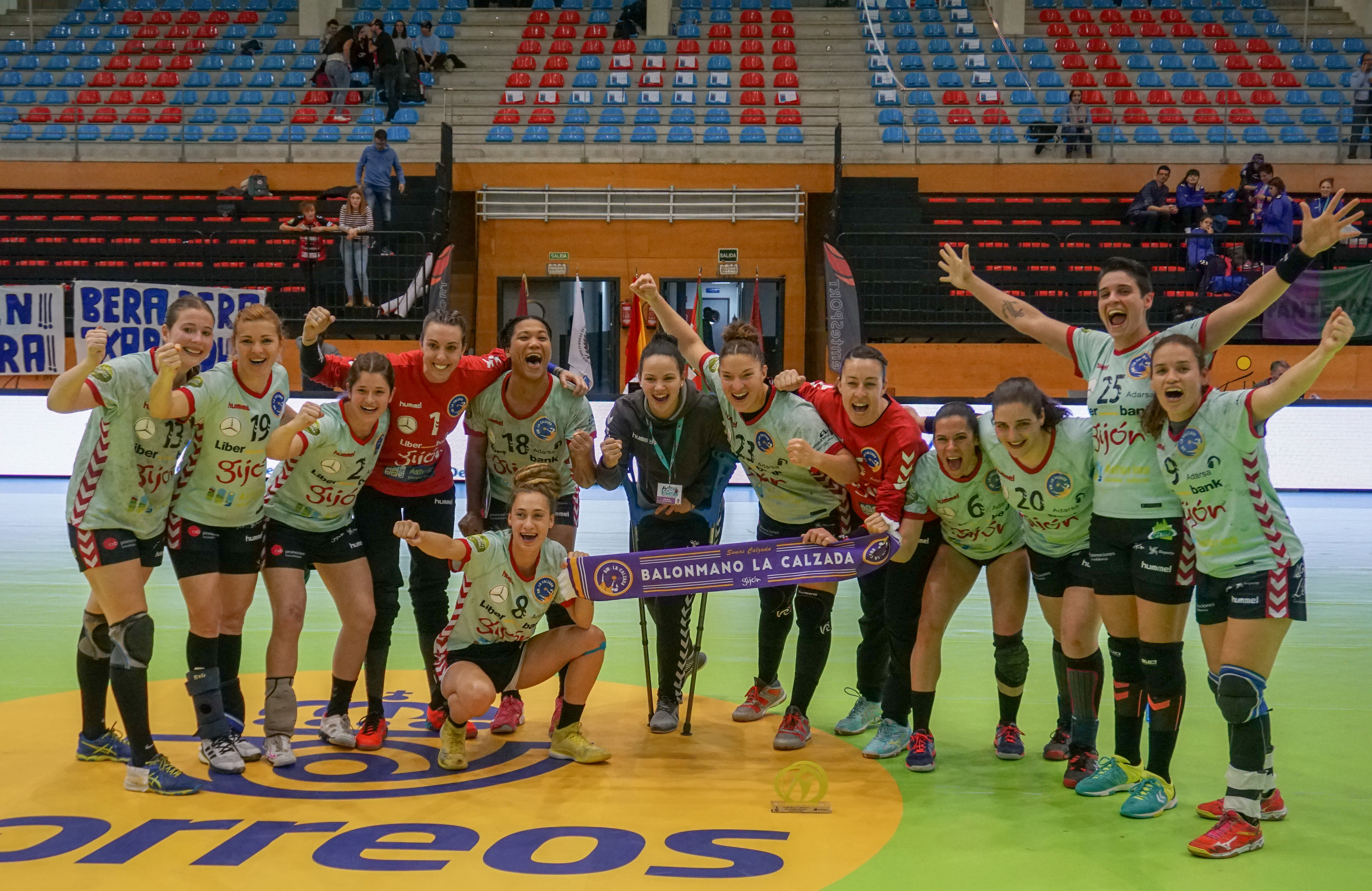 Liberbank Gijón en la Copa de la Reina 2019